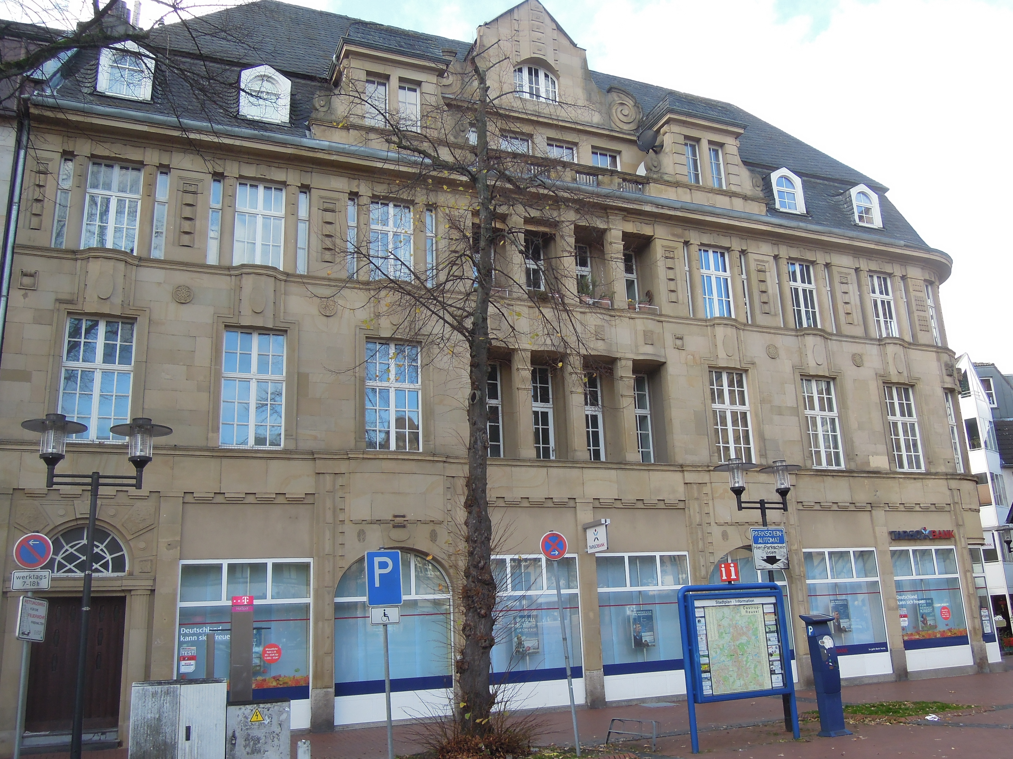 Cohen Haus Castrop-Rauxel Am Markt 24